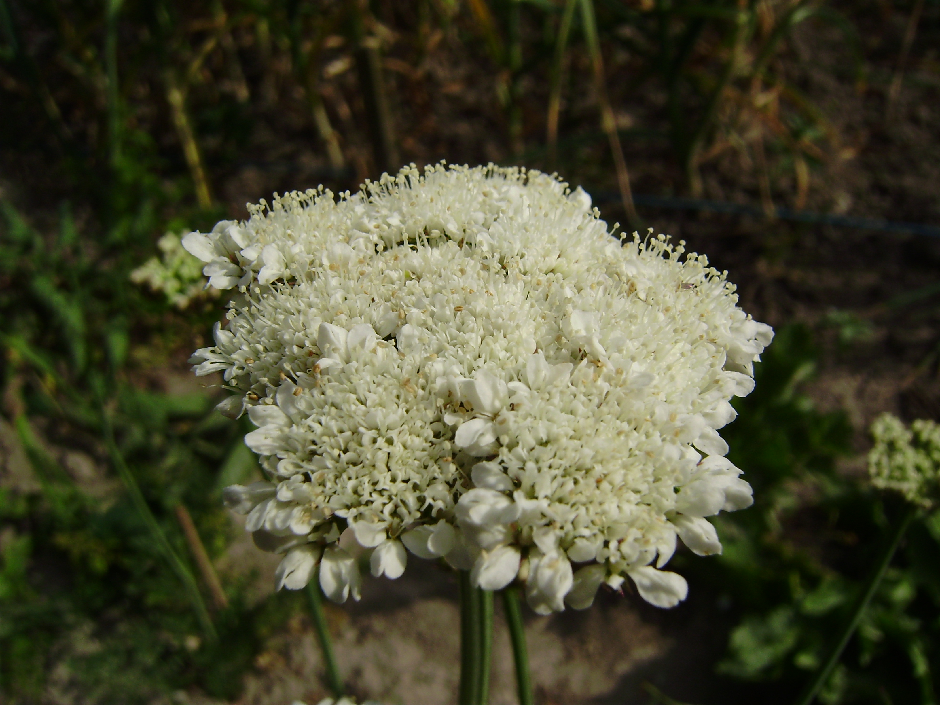 Oenanthe peucedaniifolia aardkastanje